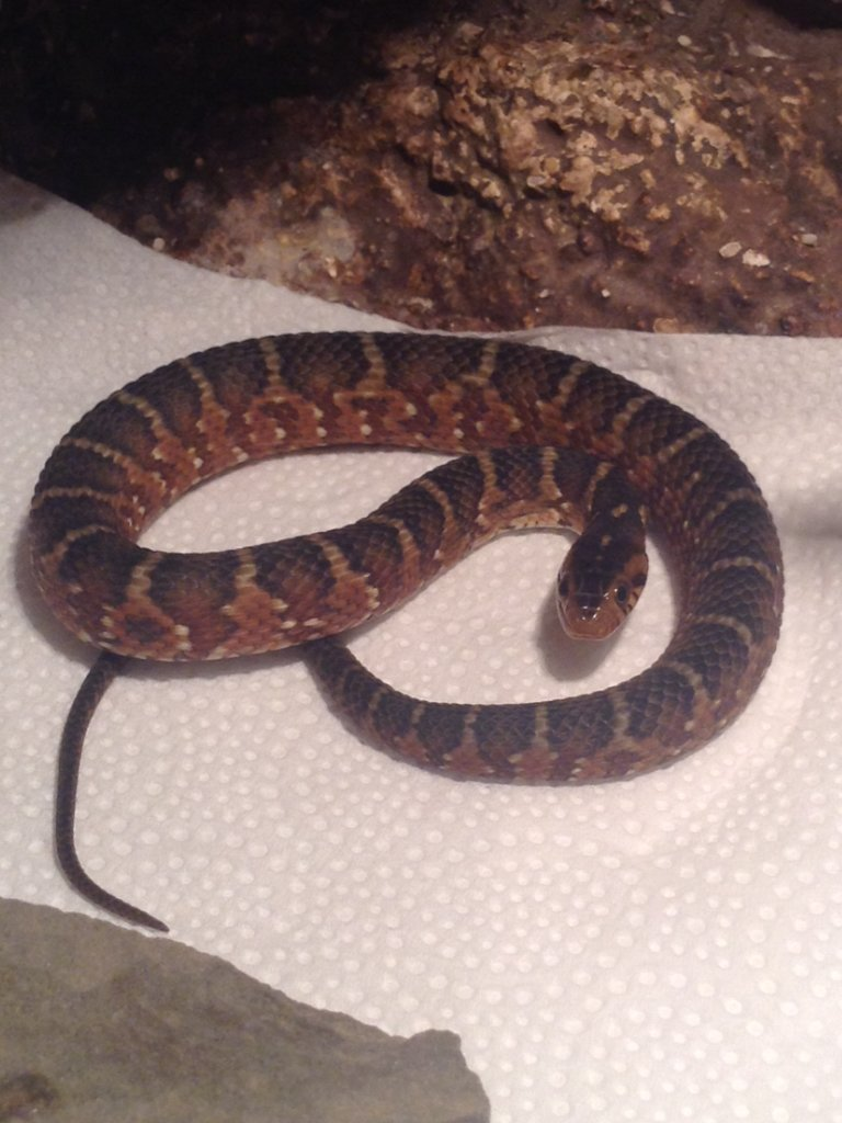 neorida